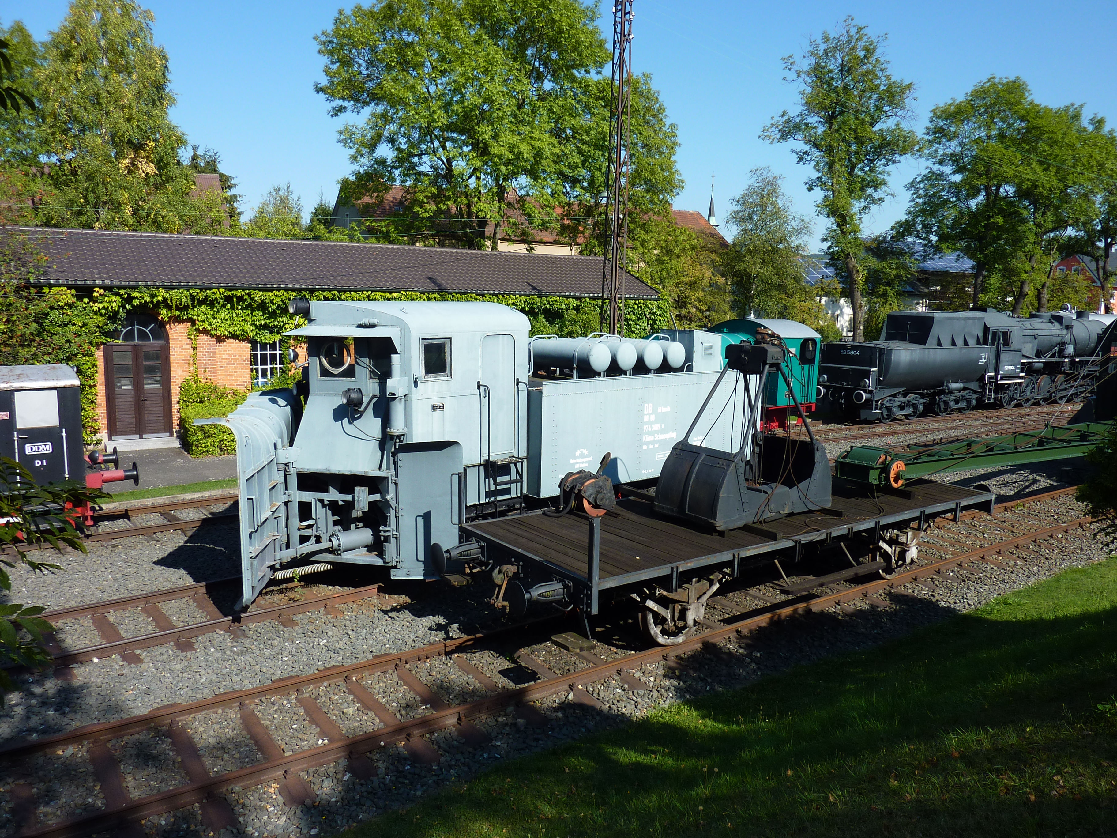 Kriegslokomotive der Baureihe 52 der Deutschen Reichsbahn mit Klima-Schneepflug im Deutsches Dampflokmuseum.